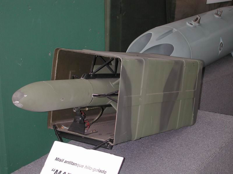 Misil antitanque filoguiado "Mathogo"